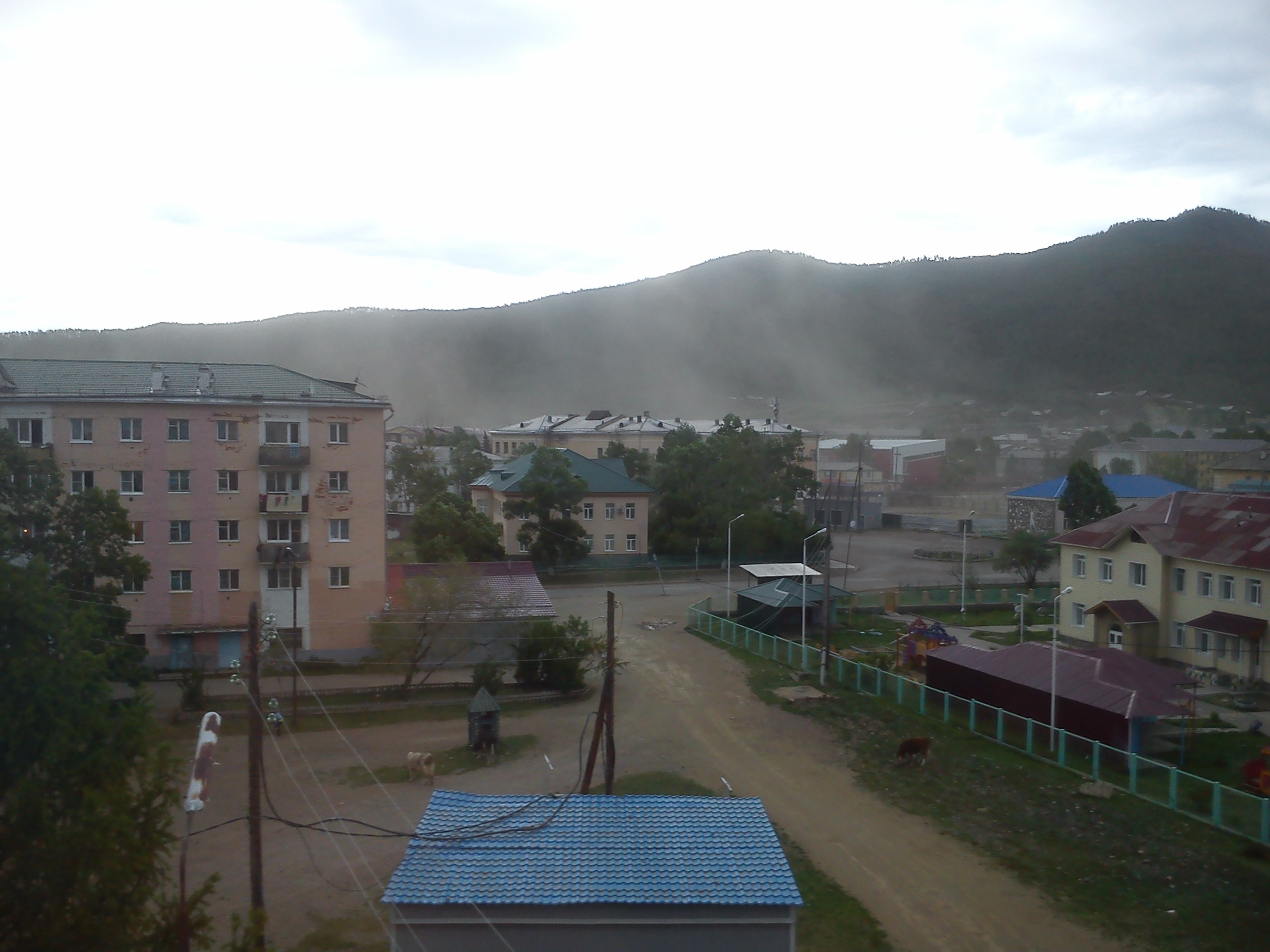 С приближением грозового фронта сильный шквалистый ветер привёл к формированию "пыльной бури" в Закаменске.